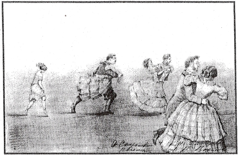 Рисунок из анонимного альбома 1850-х годов с изображением членов окружения орловского губернатора Сафоновича